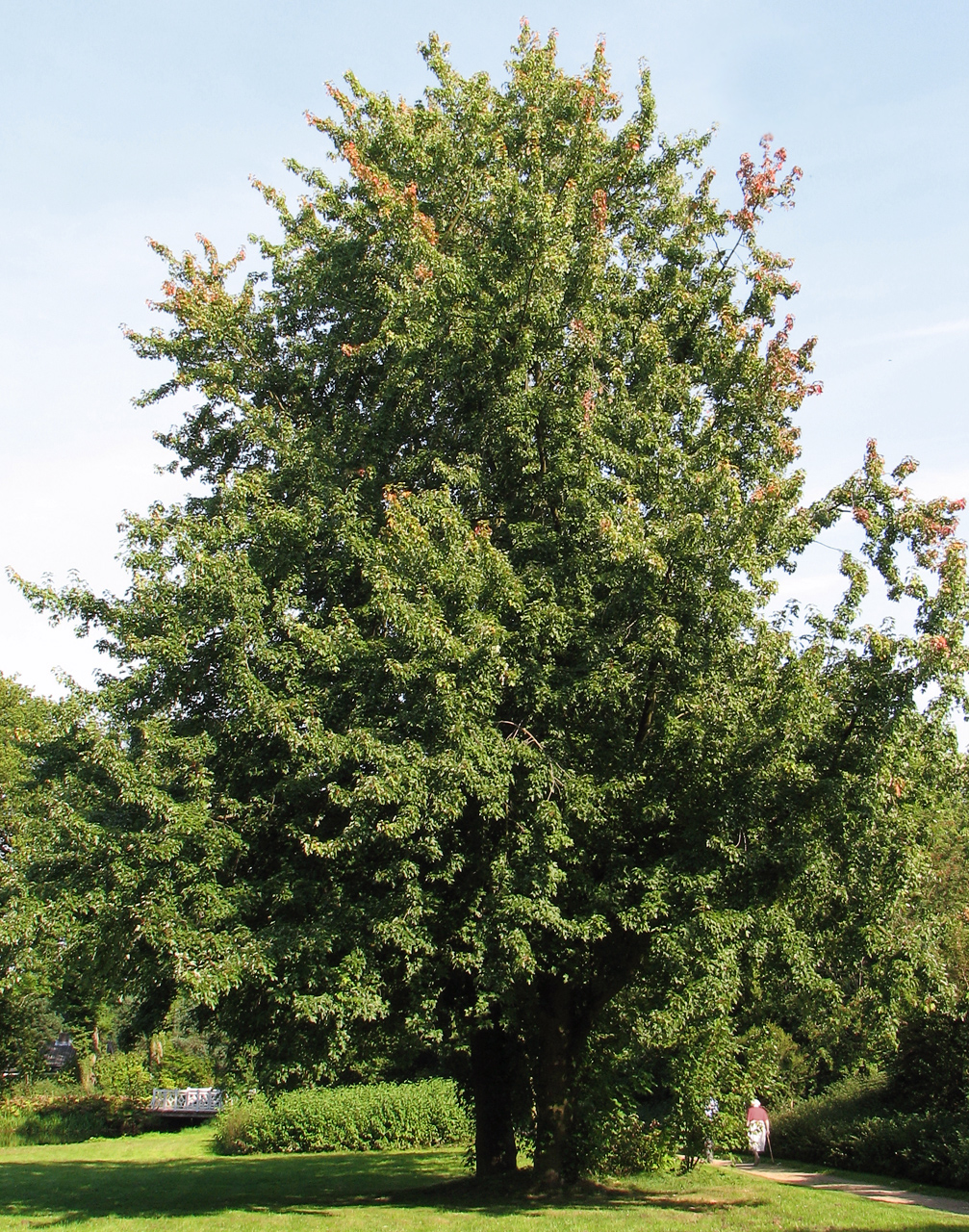 Beschreibung: Silber-Ahorn (Acer saccharinum) Fotograf: Darkone, 5. September 2005